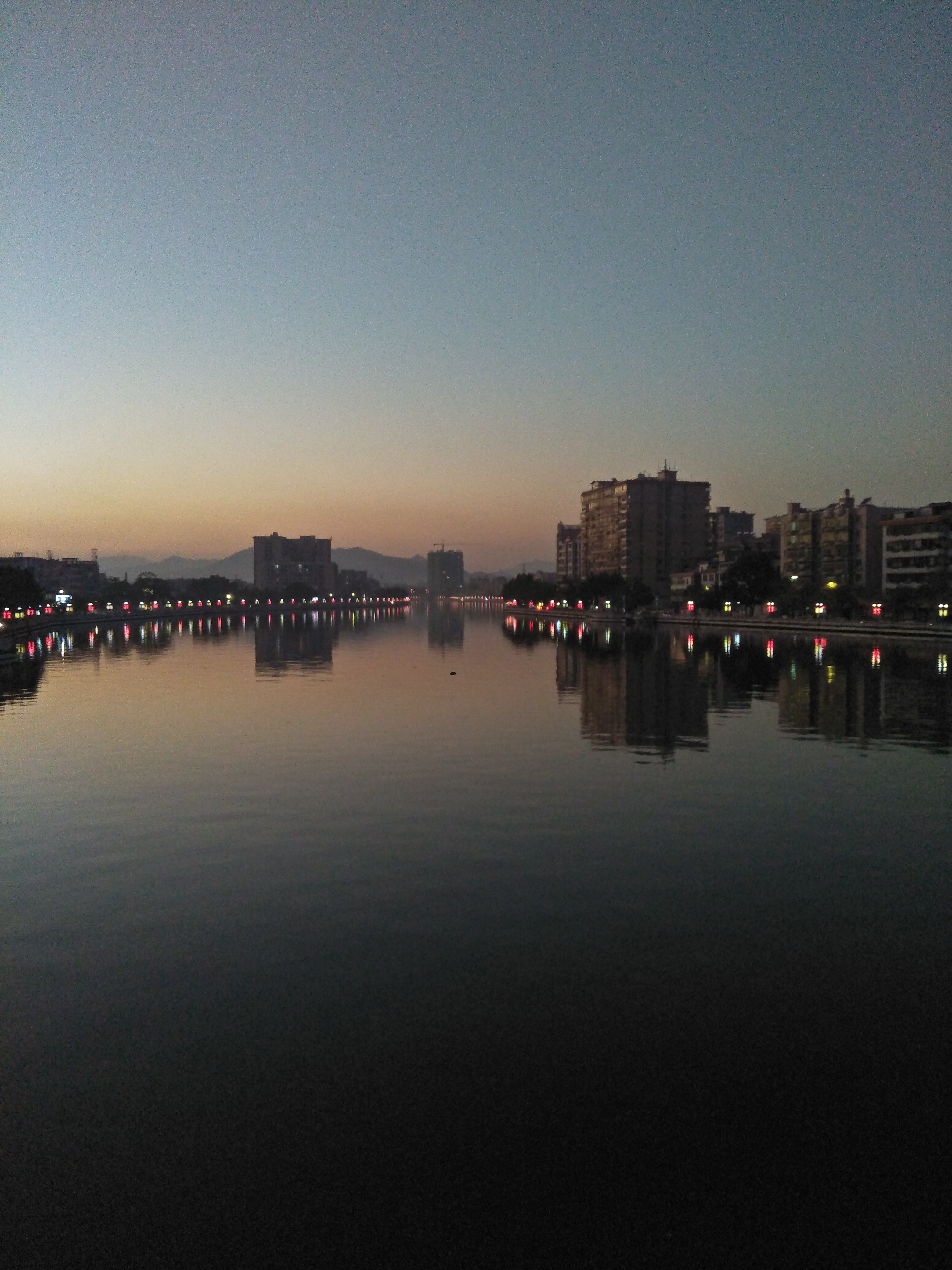 龙门县城“一河两岸”夜间风景